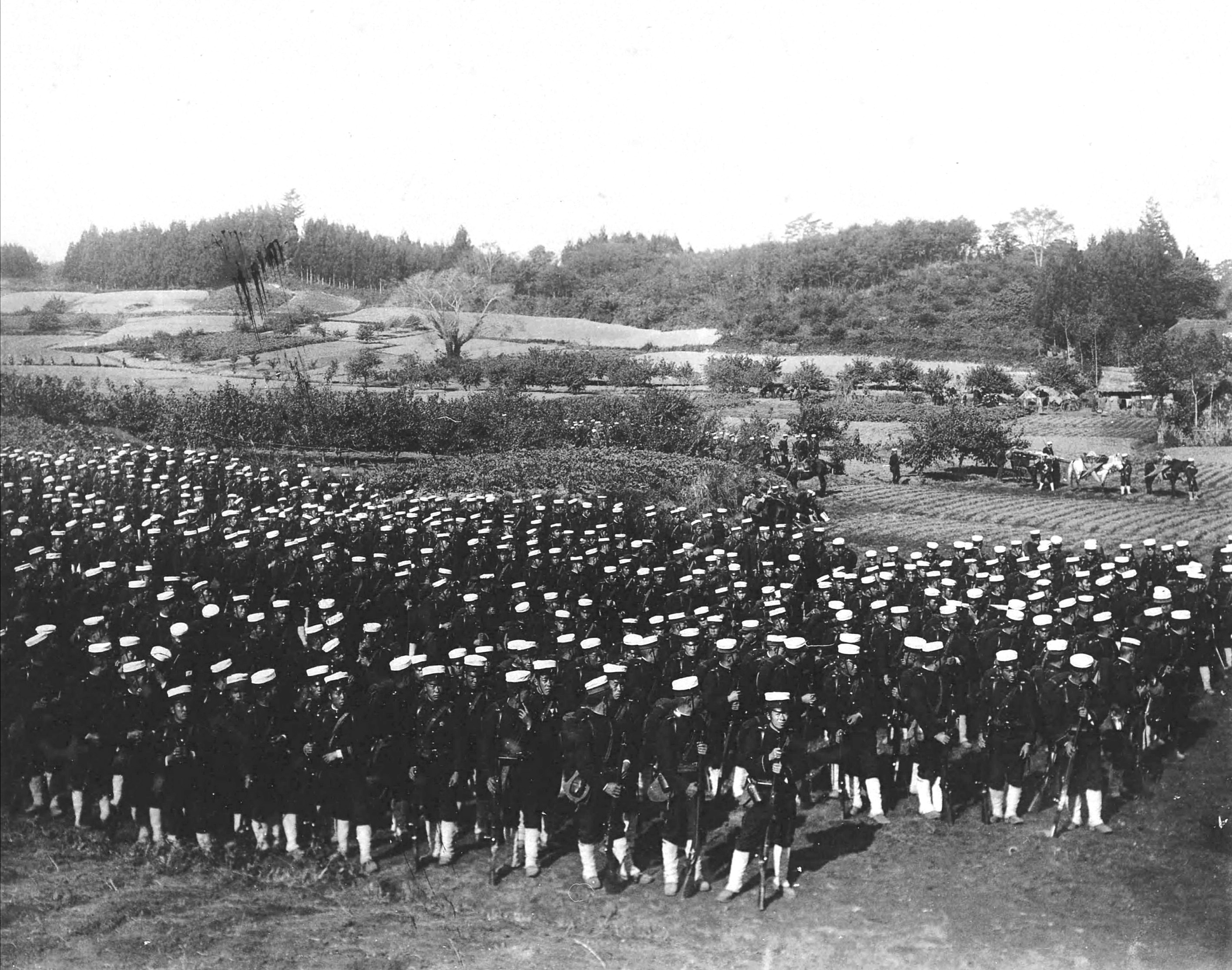 明治34年秋期陸軍特別大演習に参加する歩兵第5連隊